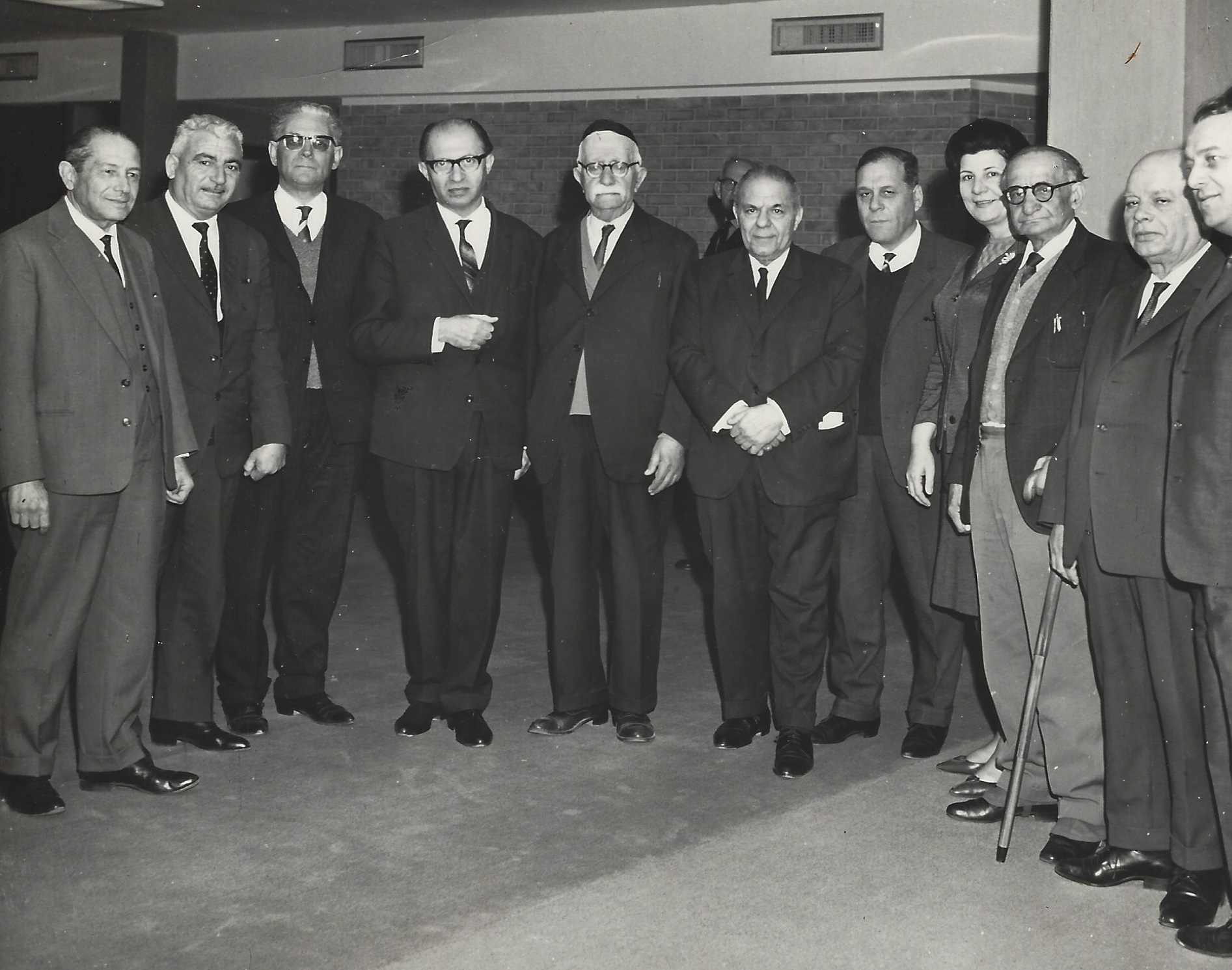 ביקור משלחת של עולים מיוון בכנסת. בחברת מנחם בגין